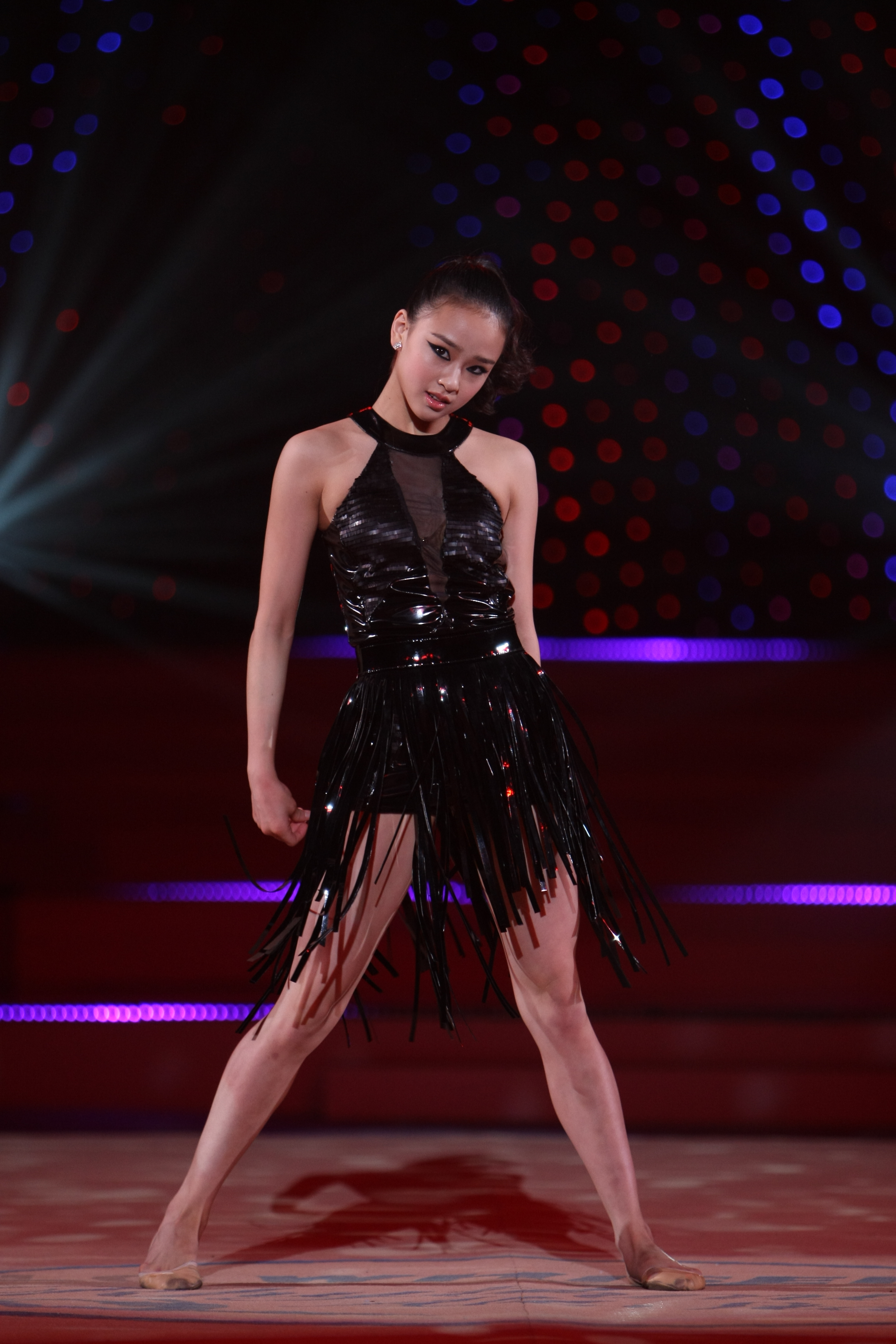 LG전자가 11일(土, 오후 3시), 12일(日, 오후 2시) 양일간 고려대학교 화정체육관 특설무대에서 국내 최초 리듬체조 갈라쇼인 ‘LG WHISEN Rhythmic All Stars 2011’ 행사를 개최했다. 사진은 11일 고려대학교 화정체육관 특설무대에서 열린 ‘LG WHISEN Rhythmic All Stars 2011’ 행사에서 LG ‘휘센’ 광고모델인 손연재(18세, 세종고) 선수를 비롯해 국내외 전•현역 리듬체조 스타들이 총출동해 멋진 리듬체조를 보여줬다.